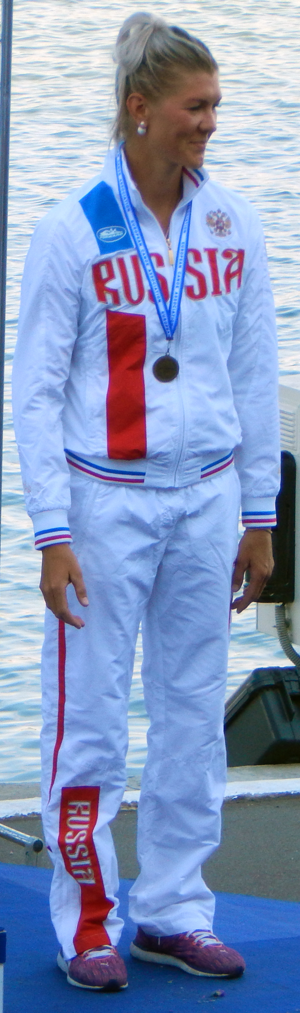 Чемпионат Европы по гребле на байдарках и каноэ 2016. Российская гребчиха-байдарочница Юлиана Булатовна Салахова, бронзовый призёр на дистанции 5000 метров